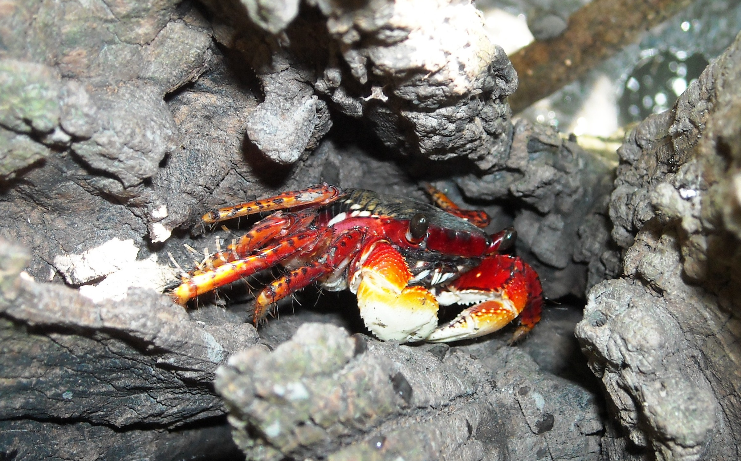 Cangrejo Rojo